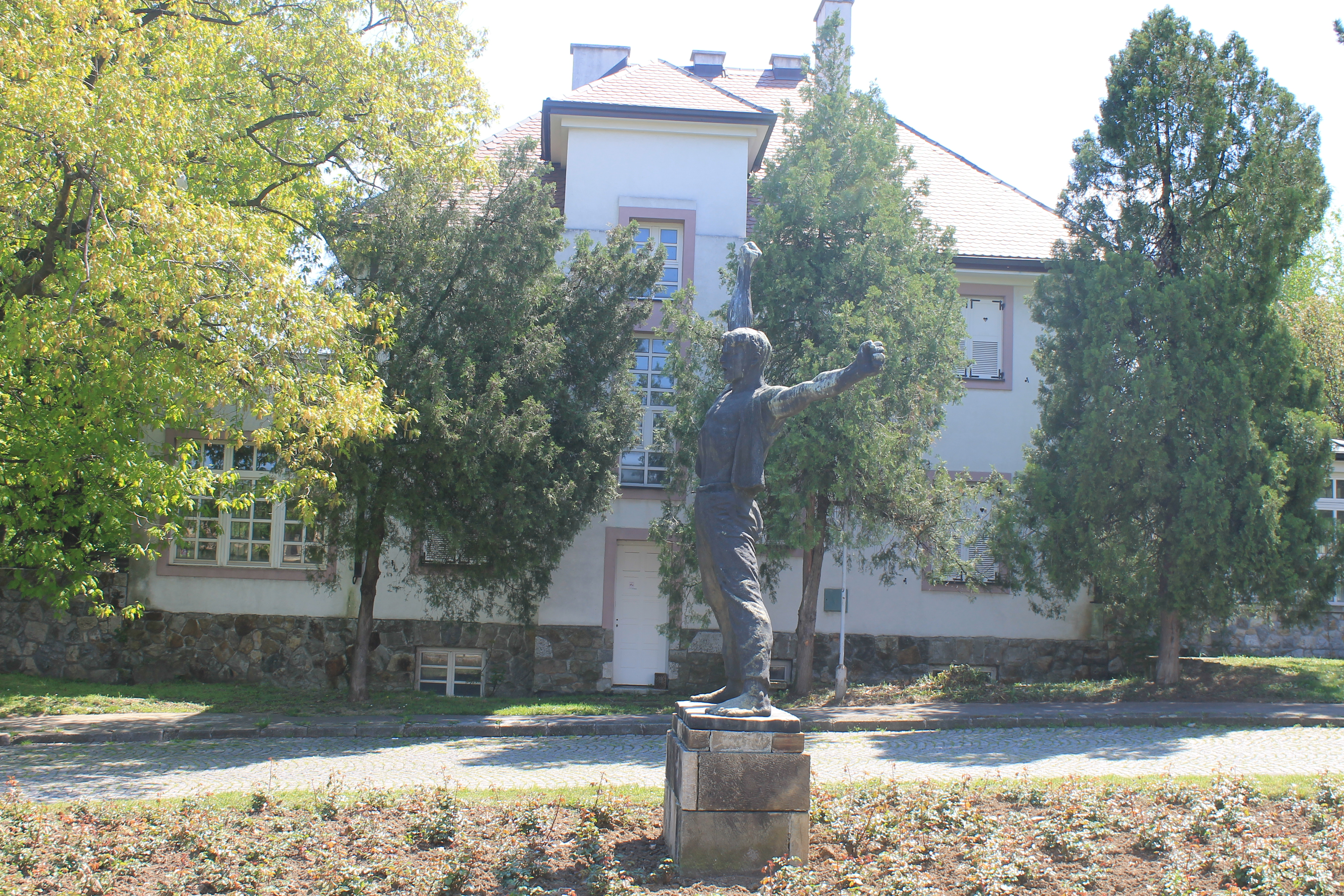 Zgrada Muzeja 4. juli i spomenik Poziv na Ustanak u Beogradu